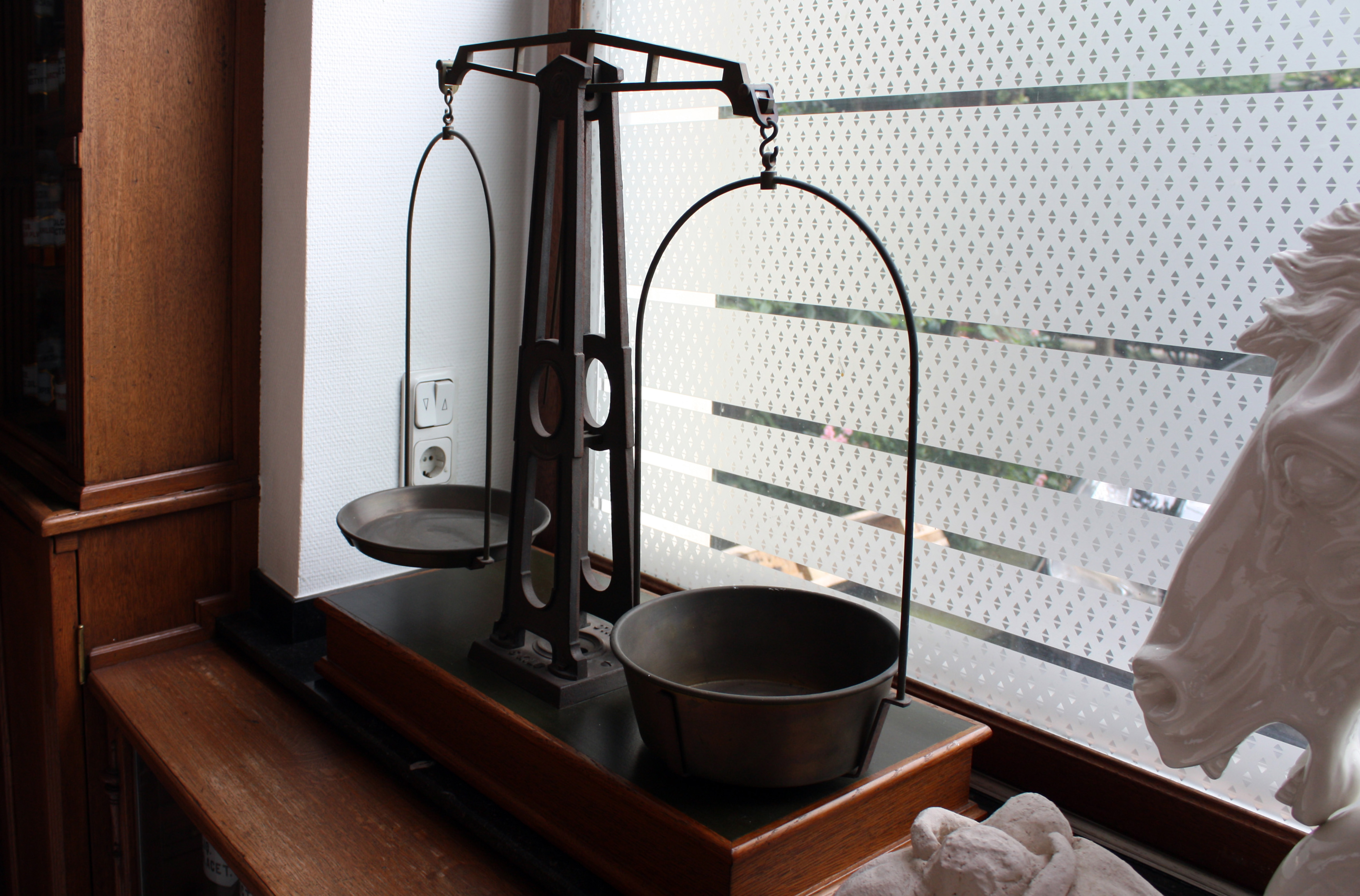 Köln, Theodor-Heuss-Ring. Waage der 1899 erbauten Kaiserapotheke